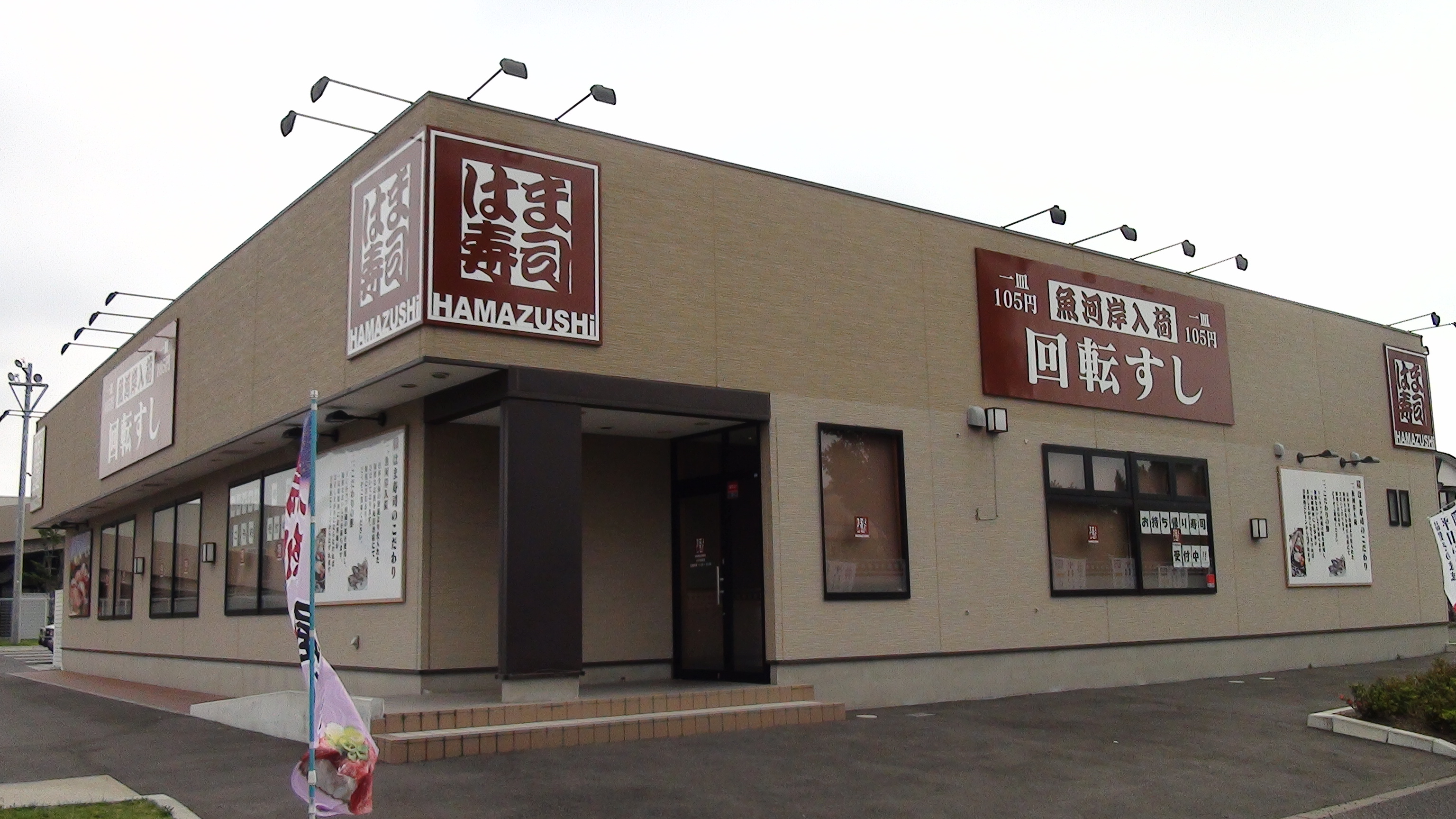 はま寿司水戸笠原